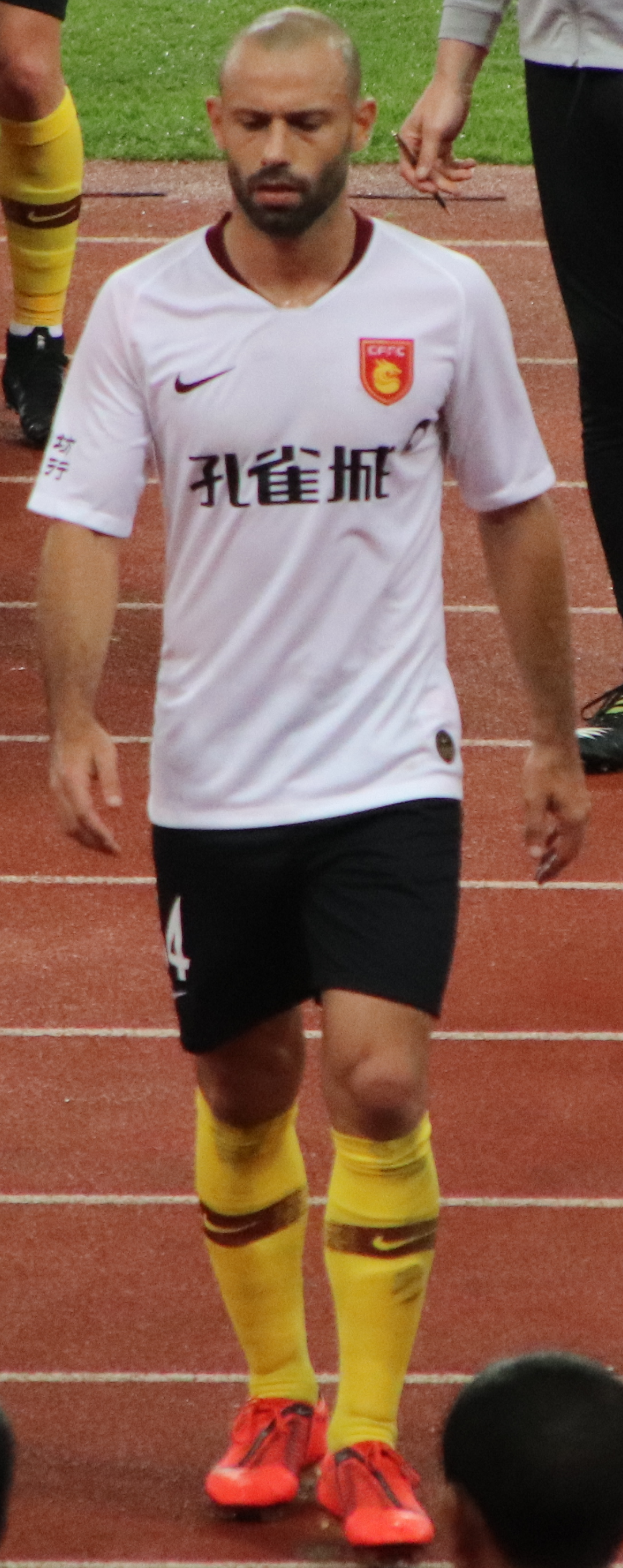 中文（中国大陆）: 河北华夏幸福球员：马斯切拉诺